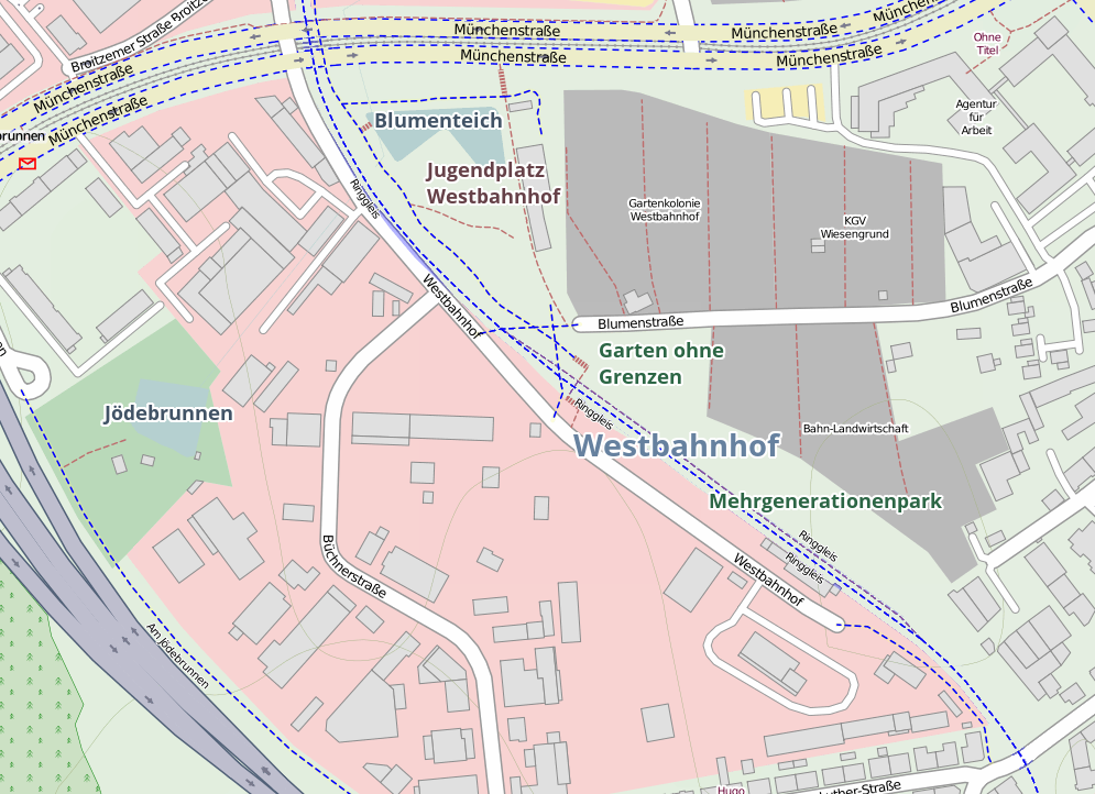 Übersicht der Grünanlage am Westbahnhof in Braunschweig 2014.